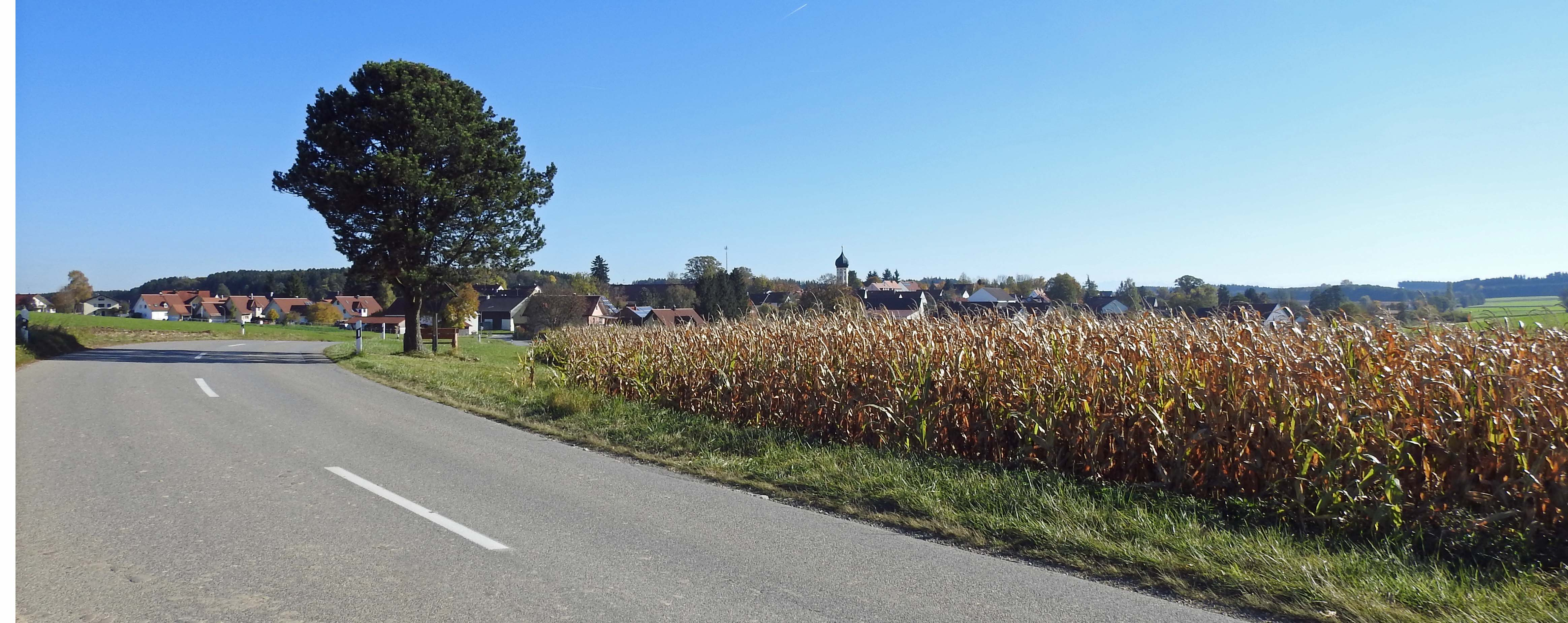 Steinbach von Nordwesten, Moorenweis